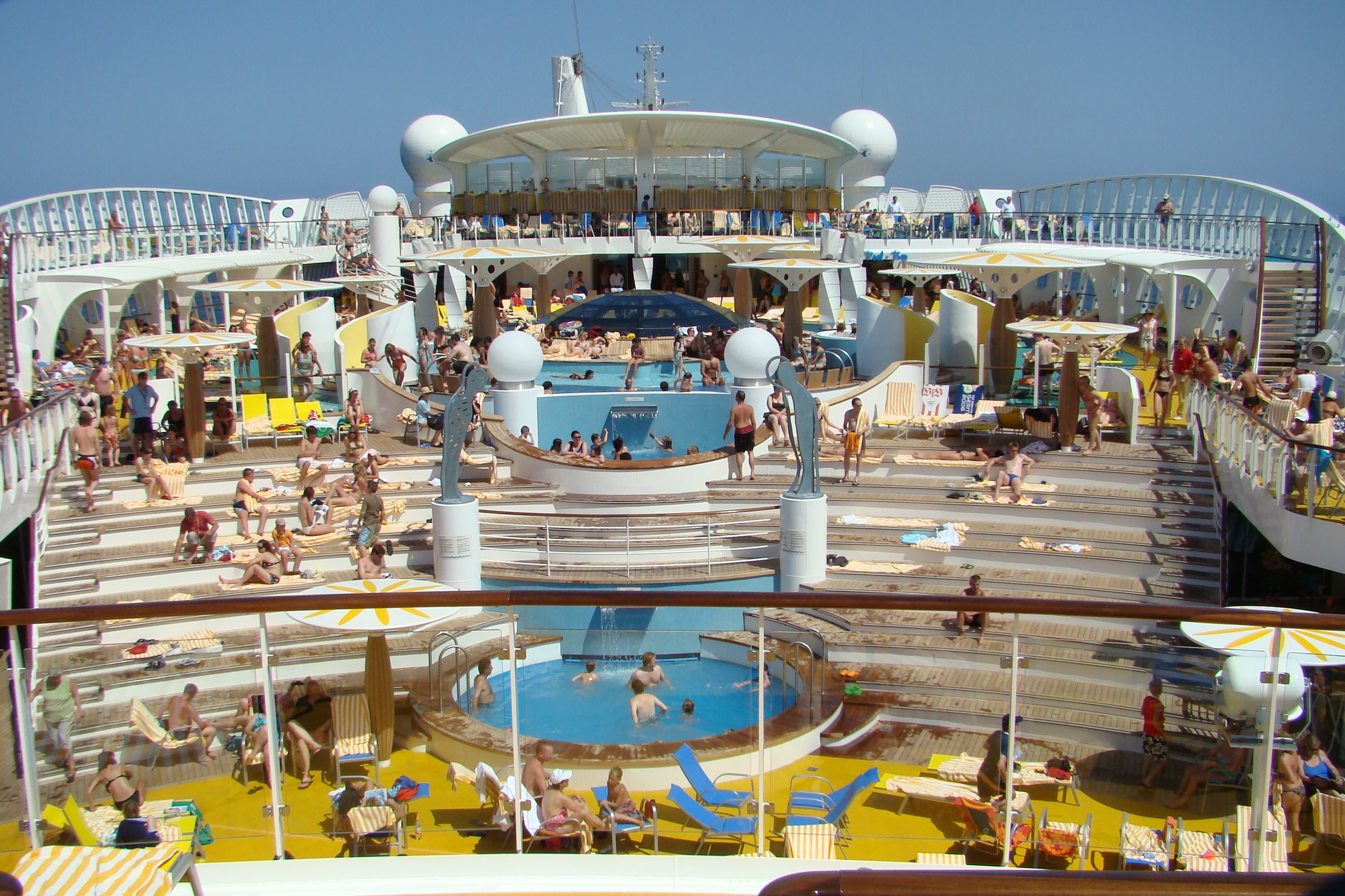 AIDAdiva Sonnen-Deck 12